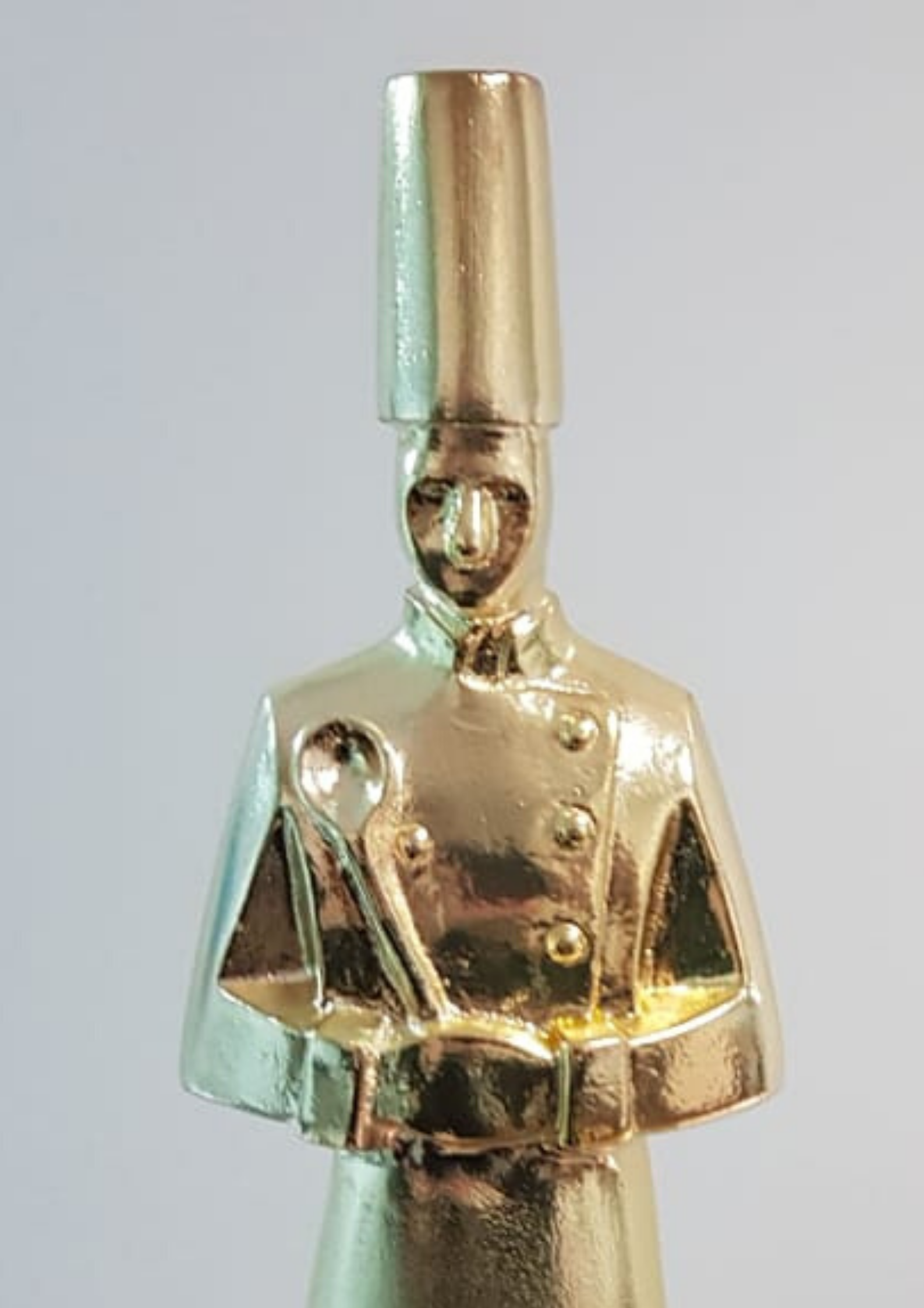 Troféu do Prêmio Nacional Dólmã